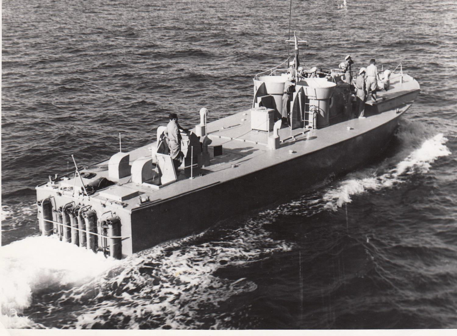 הטרפדת הראשונה אח"י נץ ט-15